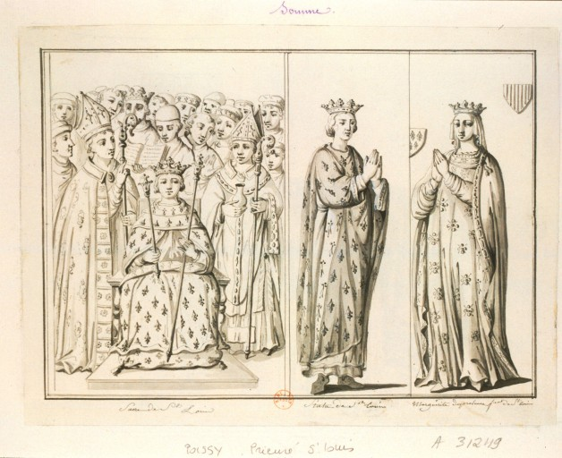 Sacre de St Louis. Statue de St Louis. Marguerite de Provence f.me de St Louis, dessin de Limozin (17..-18..)